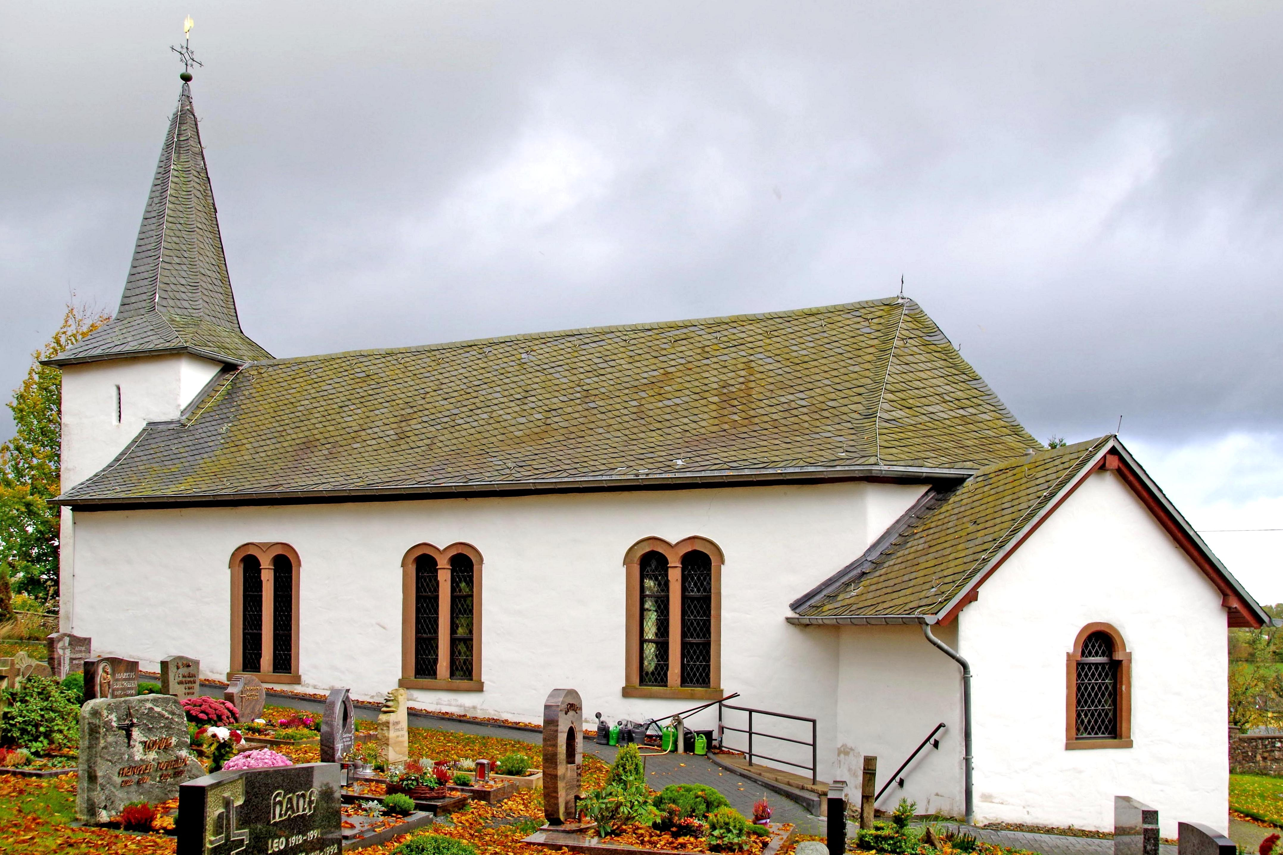 St. Gangolfus (Ramscheid), Südostseite mit Friedhof